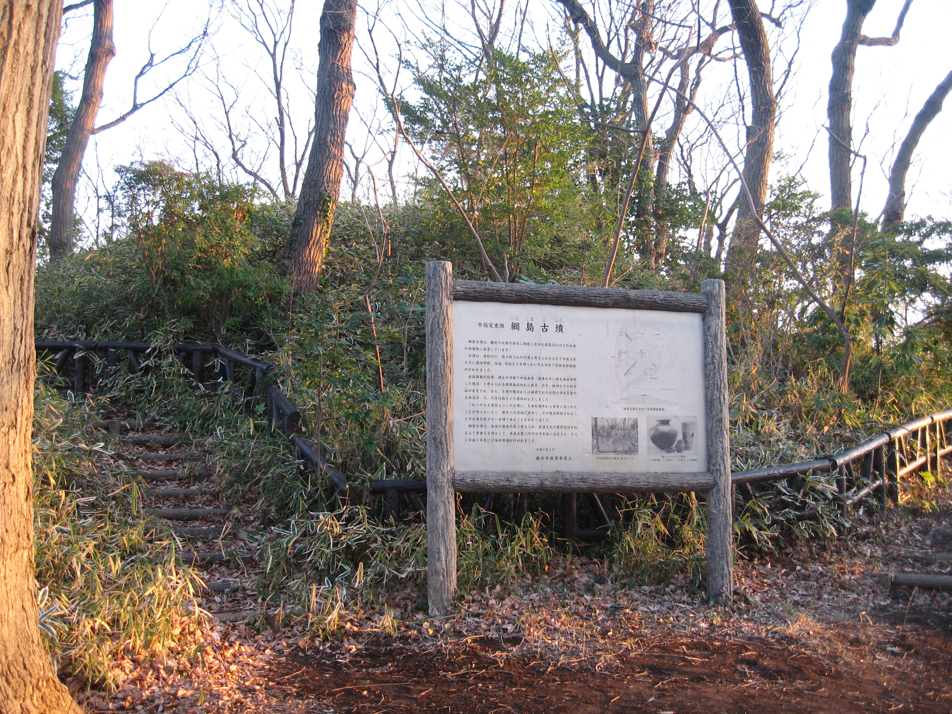 綱島古墳